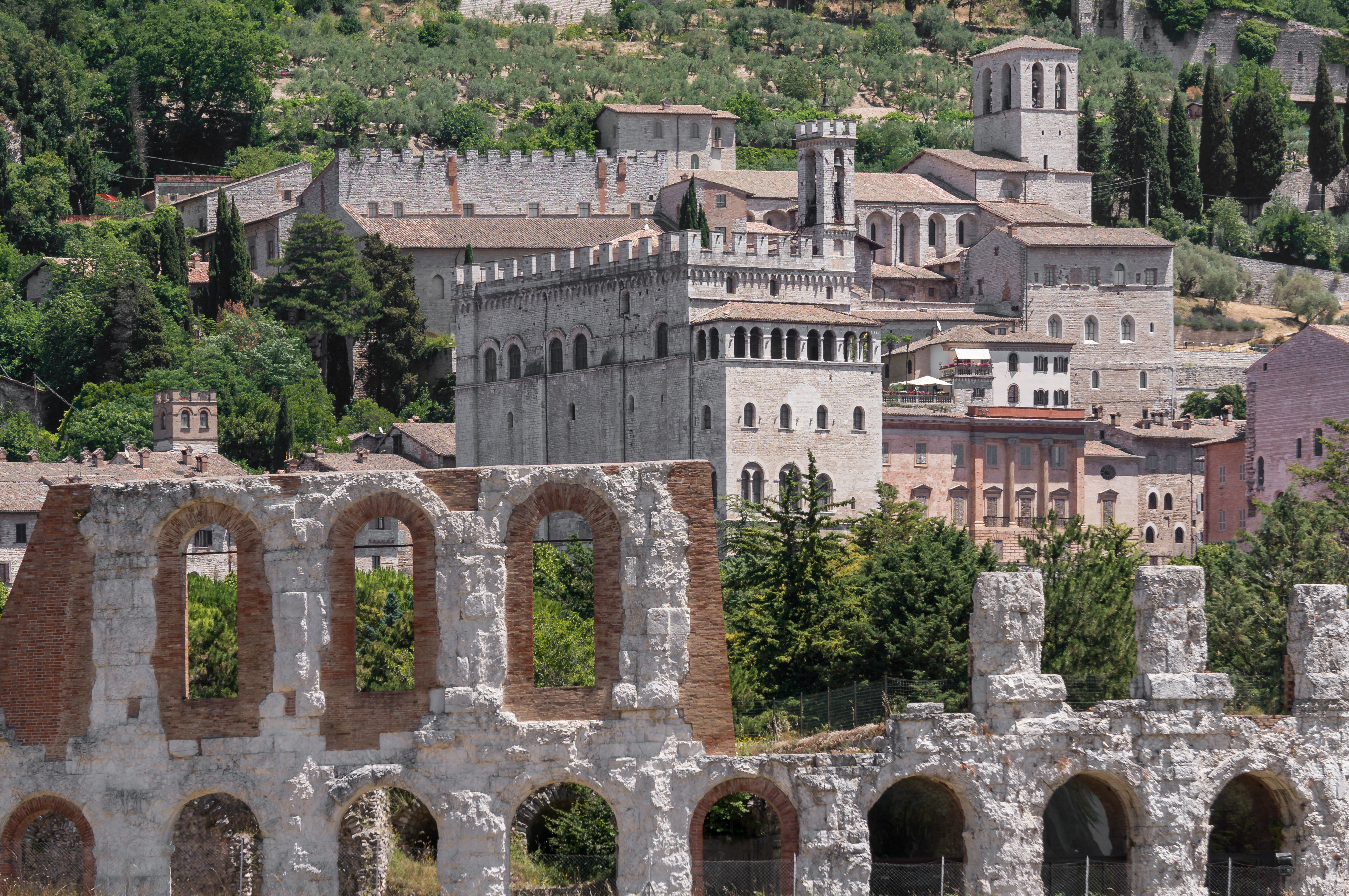 palazzo ducale This is a photo of a monument which is part of cultural heritage of Italy.